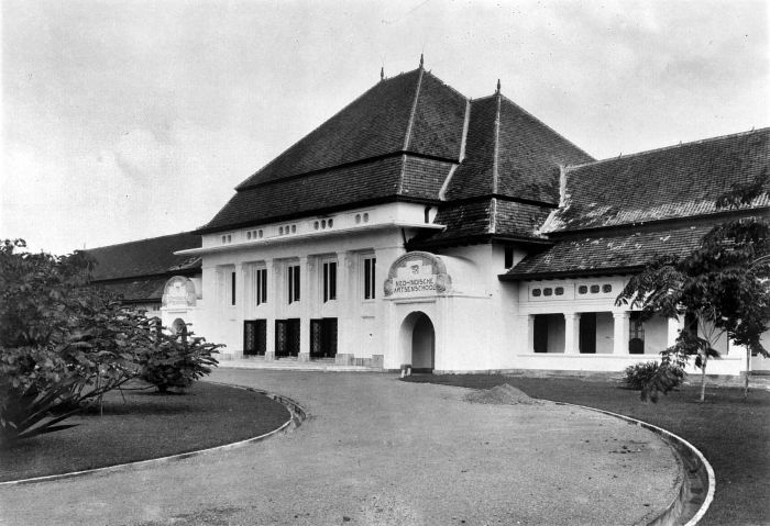 Repronegatief. Nederlands-Indische Artsenschool te Surabaya, Java, ontworpen door ir Wiemans